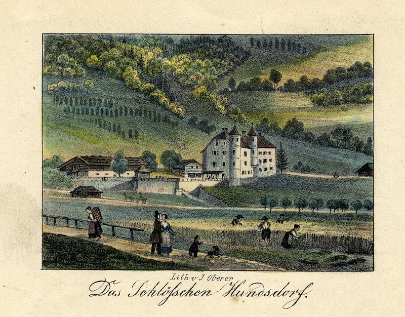 Das Schlößchen Hundsdorf (Weitmoserschlössl), Farblithographie, Mitte 19. Jh.